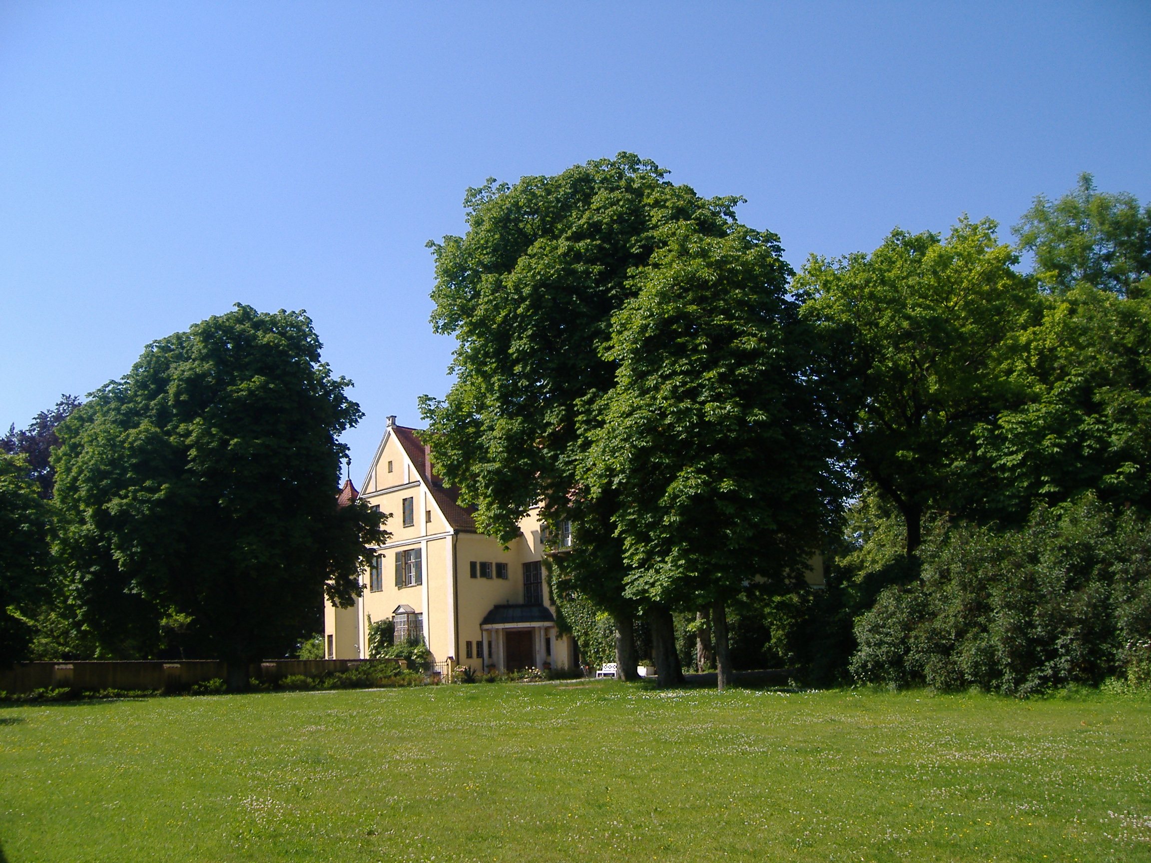 Neue Schloss Gut Hermeten